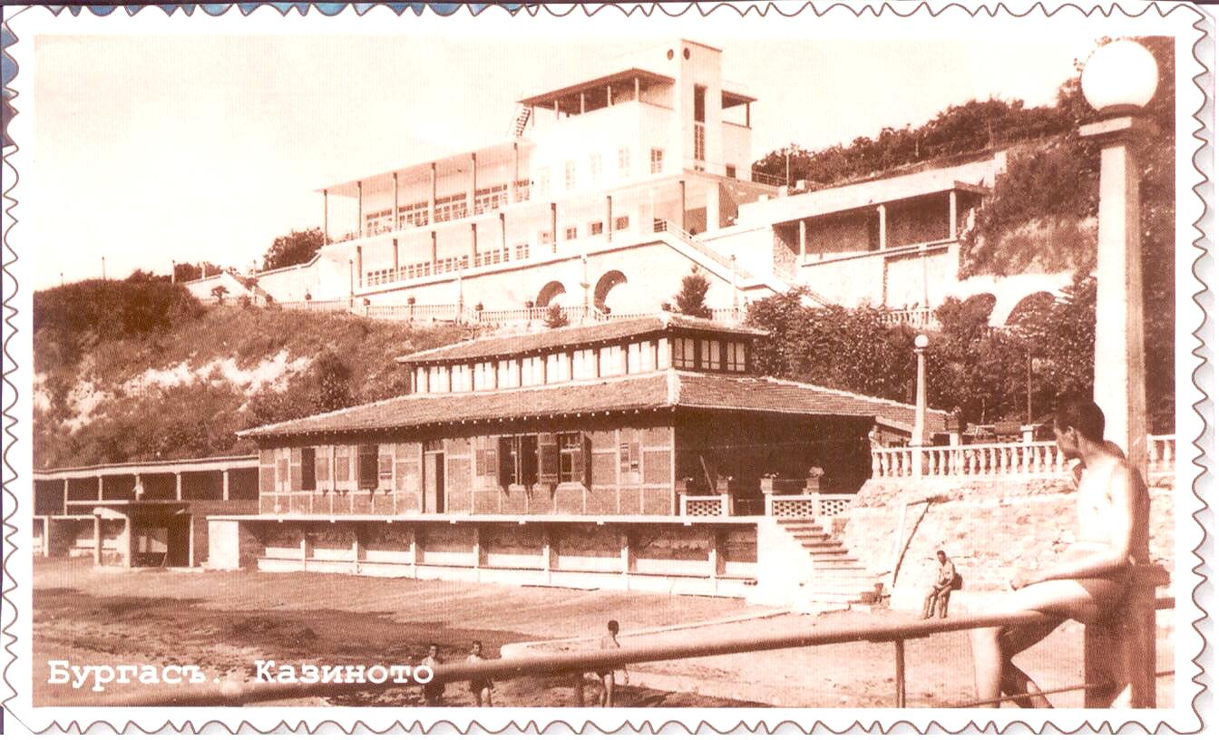 старото казино